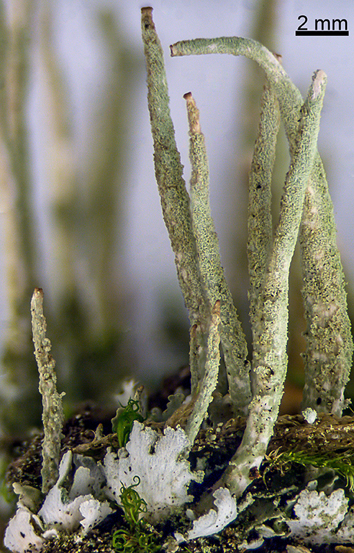 Cladonia coniocraea (Flörke) Spreng.